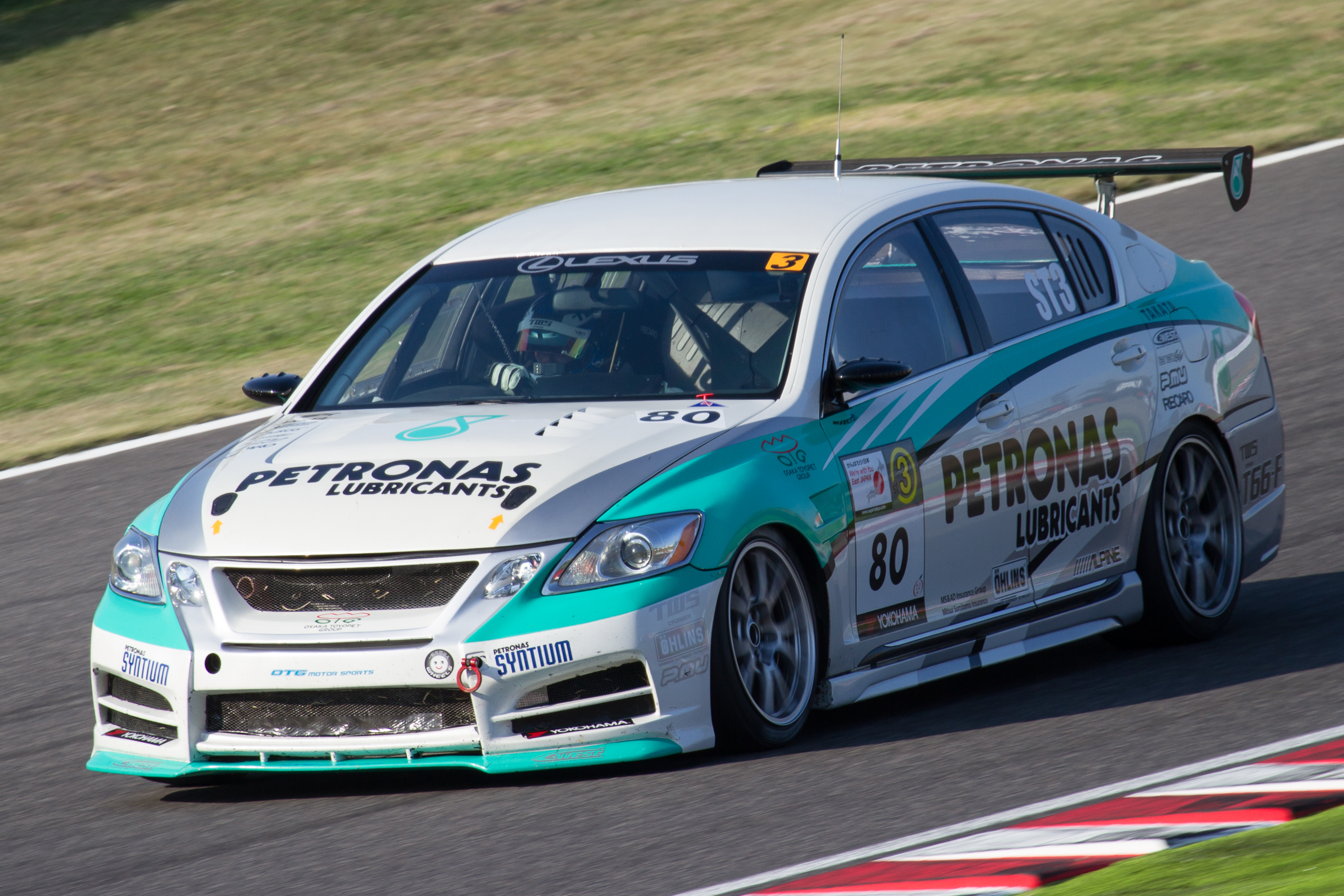 Super Taikyu 2012 Rd.5 Suzuka: Petronas TWS GS350